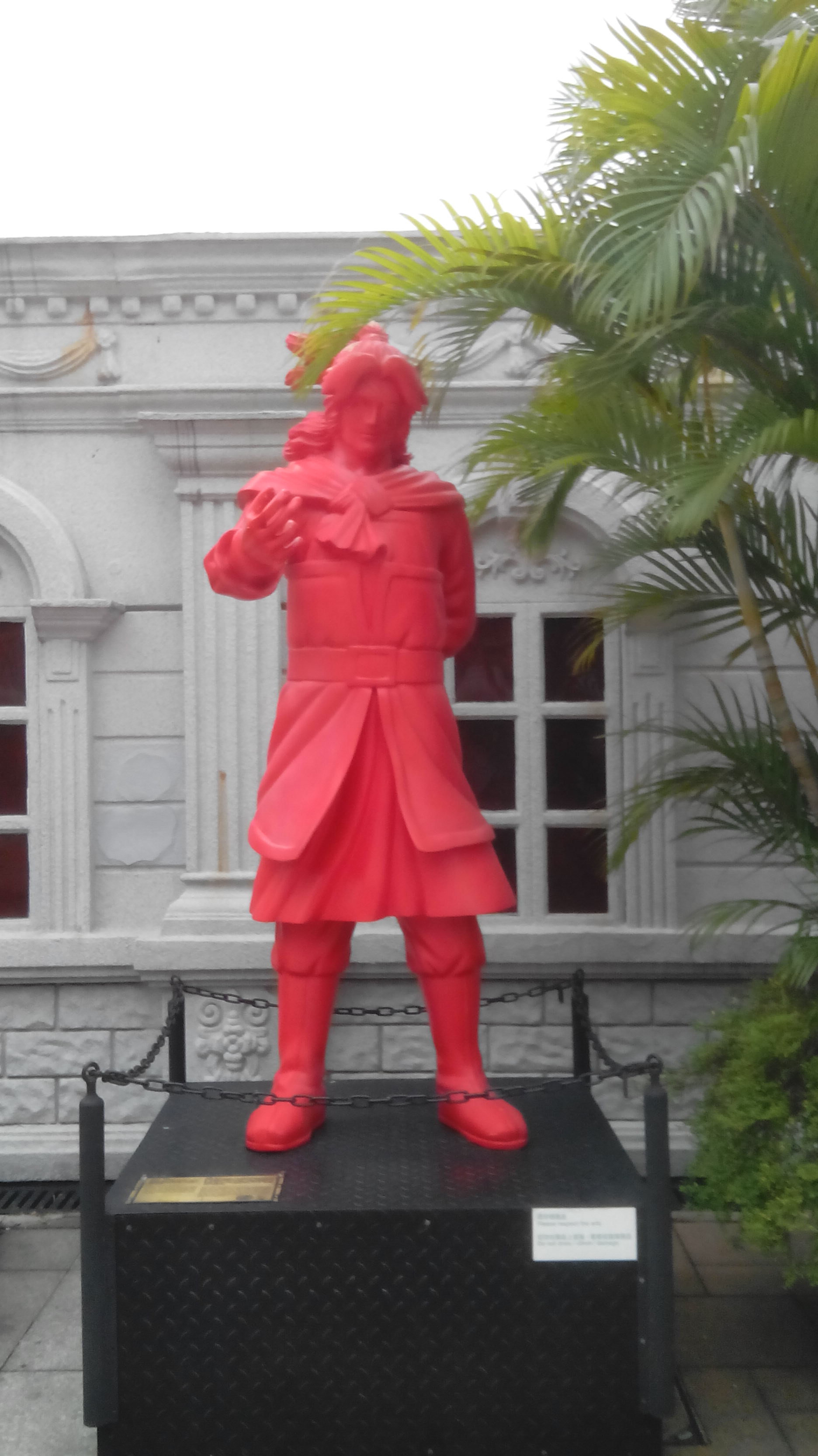 《火鳳燎原》主角-燎原火